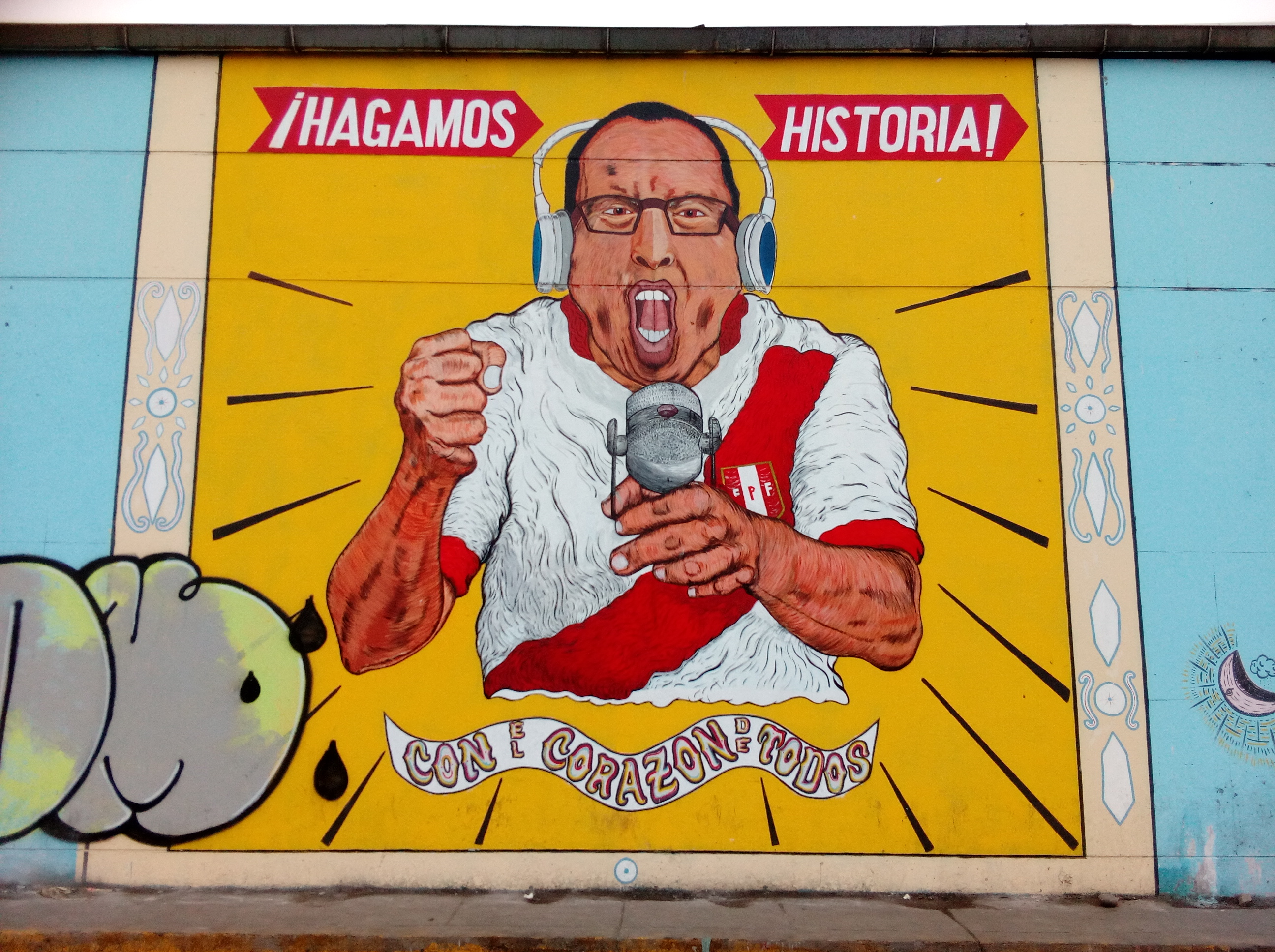 Un mural de Daniel Peredo cerca al puente del Estadio Nacional, hecho por Paulo Altamirano (Aka 'atoj.killa').